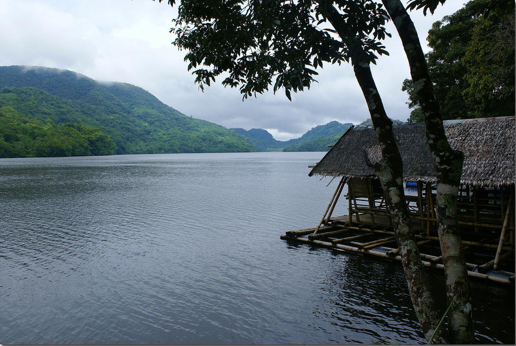 Ormoc, Leyte, Philippines